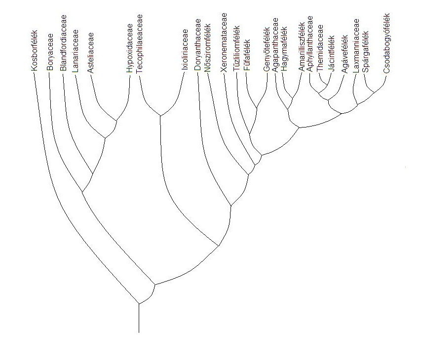 A spárgaalkatú egyszikűek (Asparagales) belső rokonsági kapcsolatai egy hagyományosnak tetsző, de a kladogram-szabályoknak megfelelő elágazással